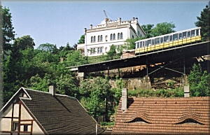 Public Domain. Loschwitz Der Fotograf erlaubt jedem die Bildnutzung in dieser Auflösung.